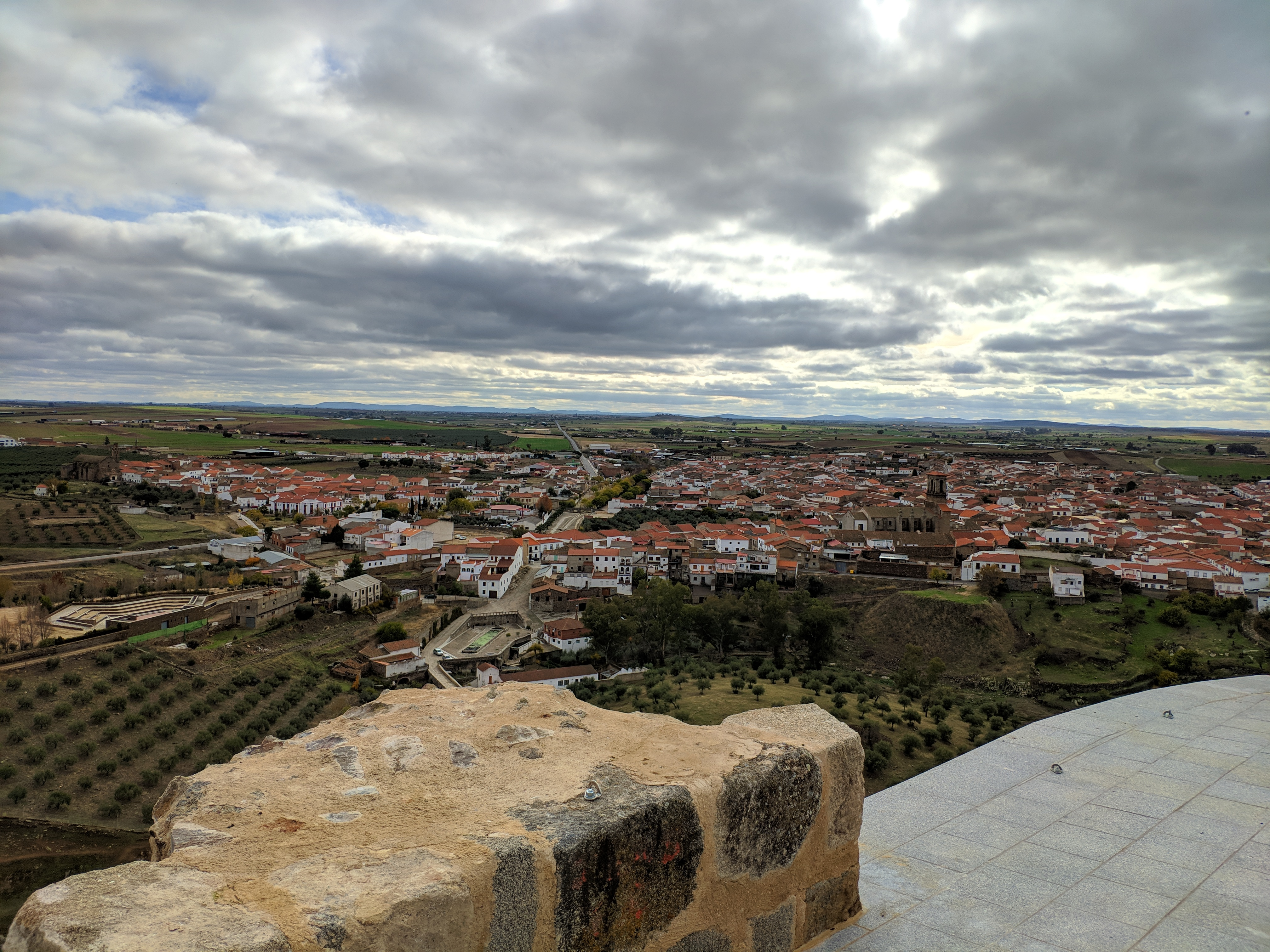 Vista del pueblo de Belalcázar, desde la última planta de la Torre del Homenaje.